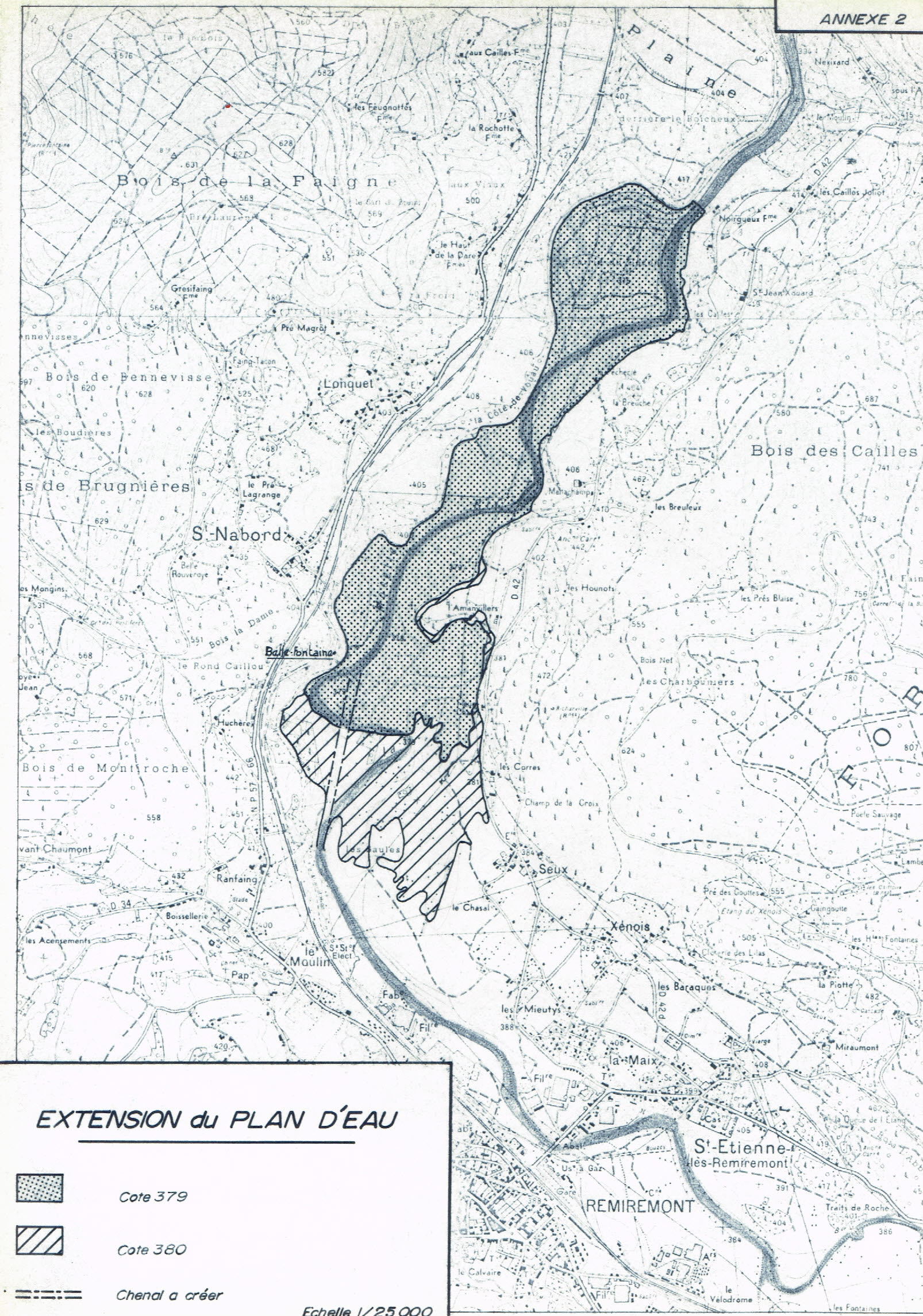 Département des Vosges, « Plan d’eau de Noirgueux », Site de plan d'eau de Remiremont, Reconnaissances 1969, Rapport de synthèse. A la suite du rapport technique sommaire du 4 janvier 1963 d'André Gravier, ingénieur conseil des études ont été réalisées par l’Agence financière de bassin Rhin-Meuse en janvier 1970, lesquelles seront complétées par celles de l’AGORA - LORRAINE et la SEBA, en janvier 1971 pour le compte du Conseil général des Vosges, sous la direction de l’Office départemental du tourisme des Vosges. Extension du plan d'eau aux cotes 379 et 380. Annexe 2